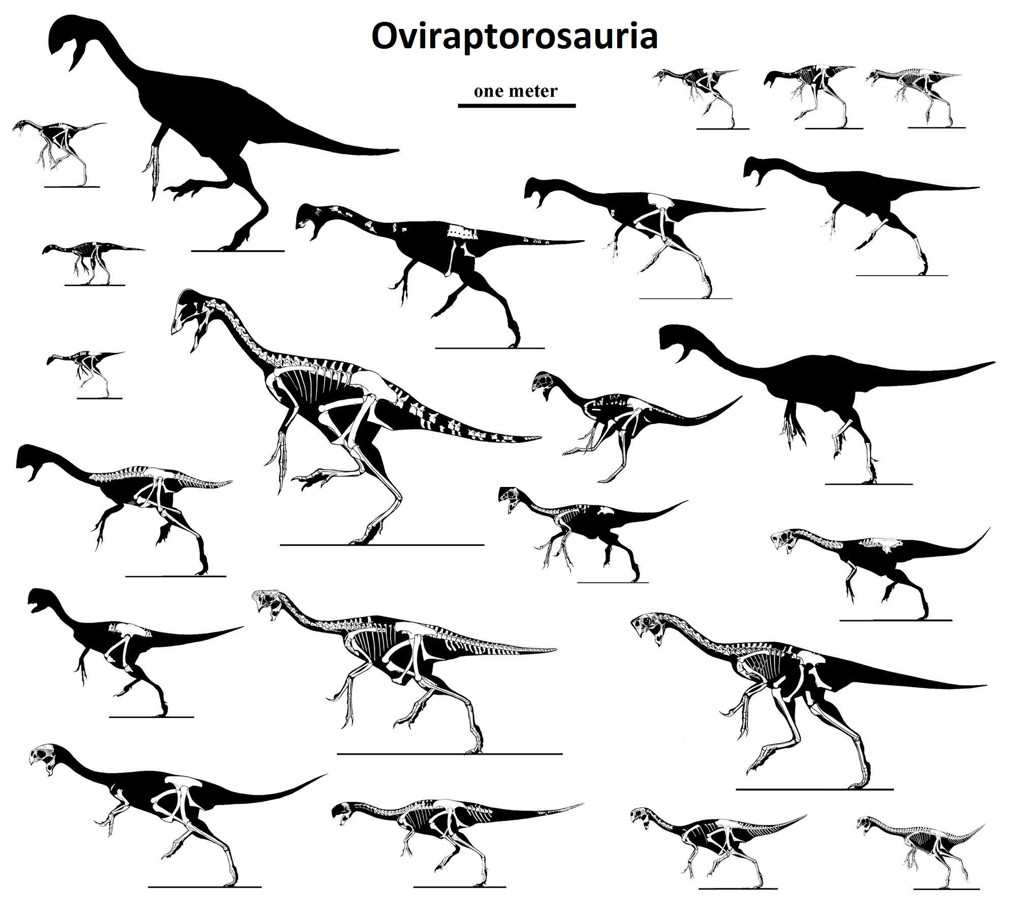 Oviraptorosaur skeletons to scale.